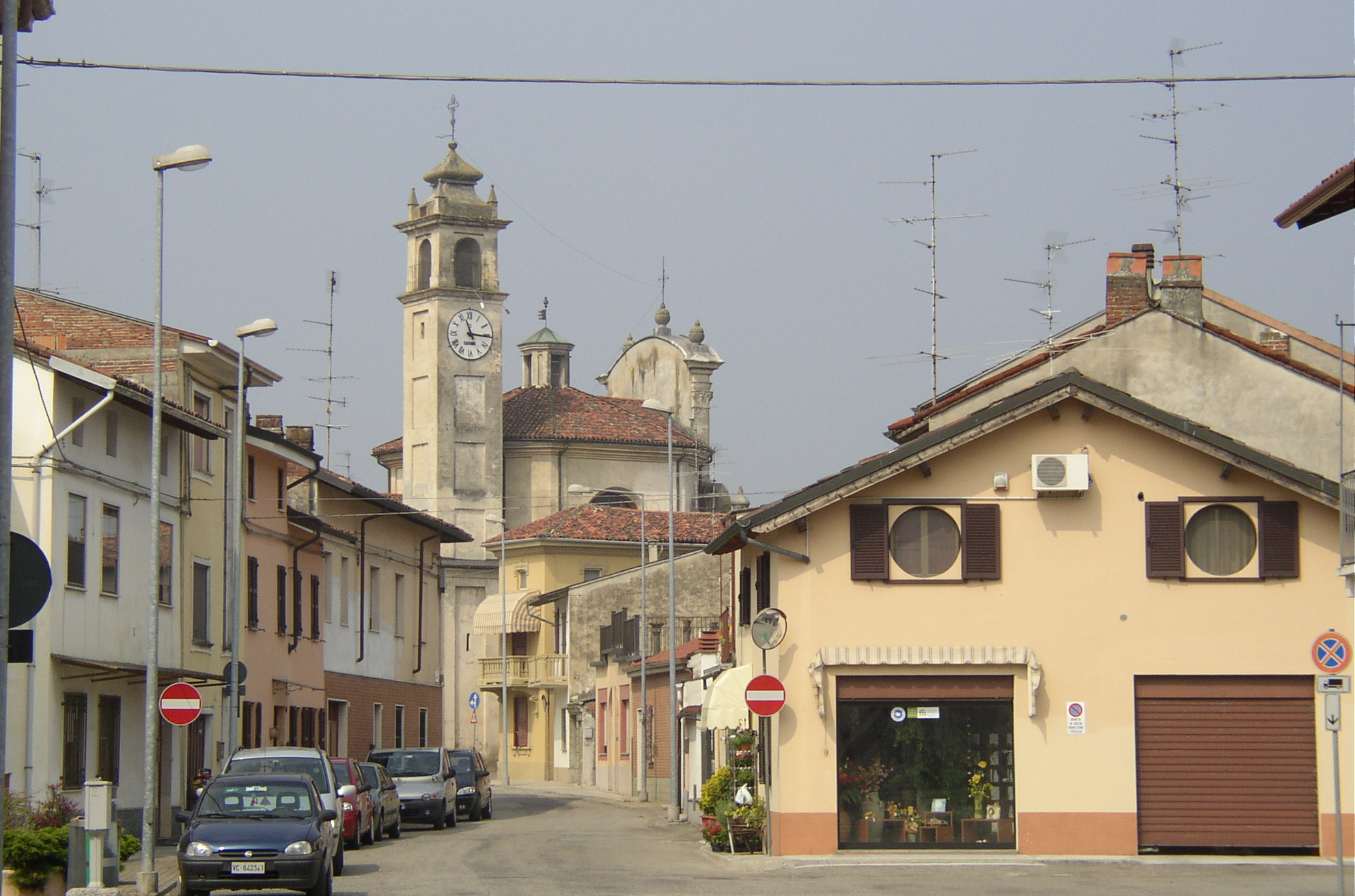 Alexandra Galantseva, 2006